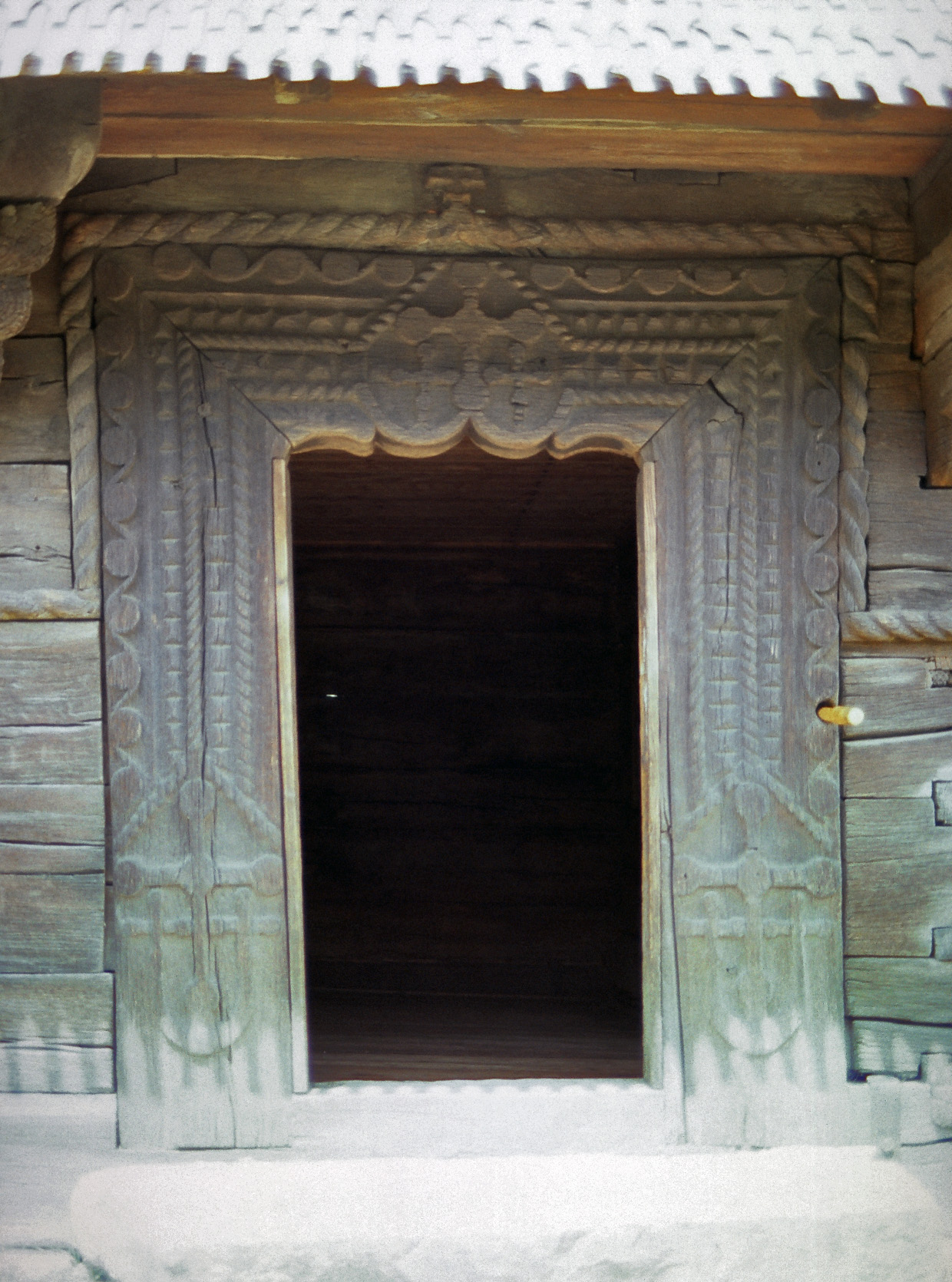 Main door of Chiraleş wooden church - in the Ethnographic Museum of Transylvania in Cluj-Napoca / porte de l'église en bois de Chiraleş (dans le Musée ethnographique de Transylvanie